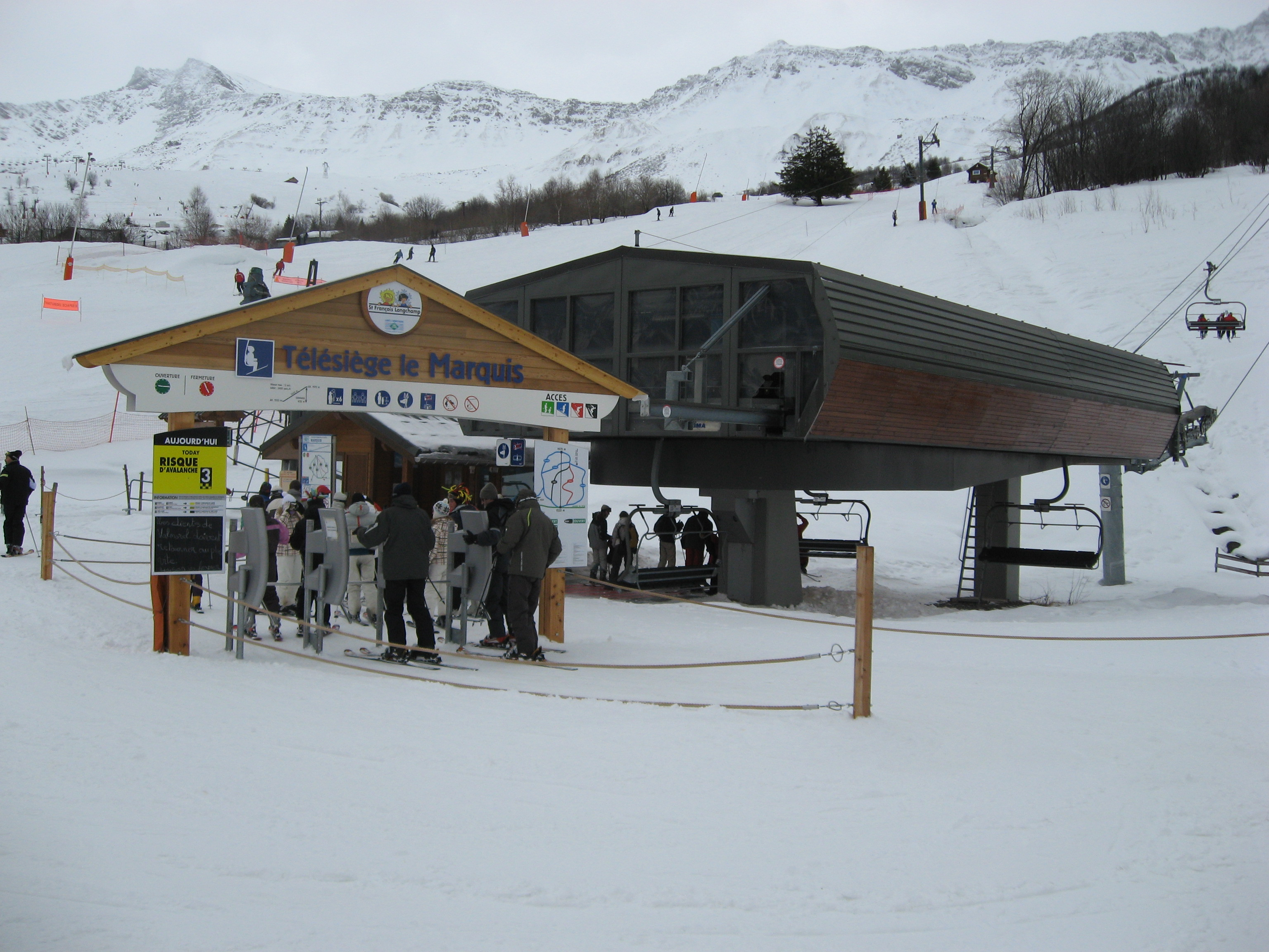 De stoeltjeslift le Marquis in St. François Longchamp.